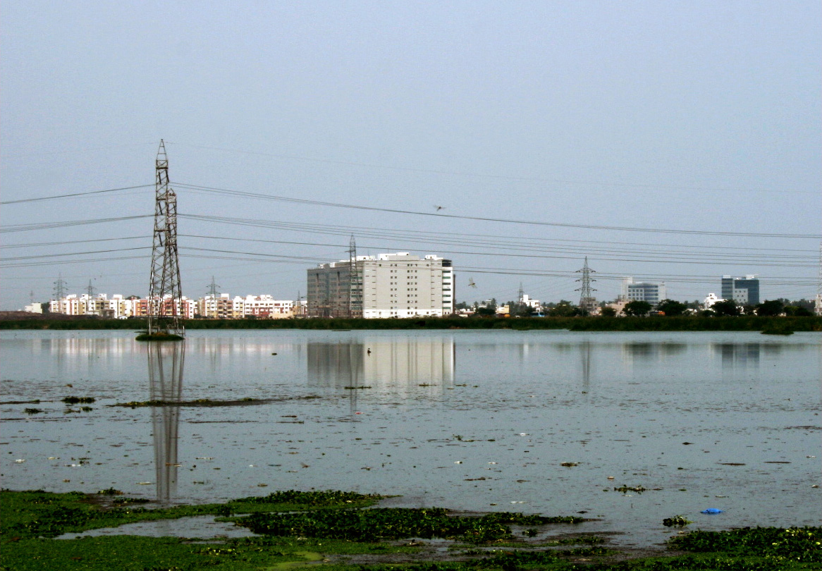 Pallikaranai marsh